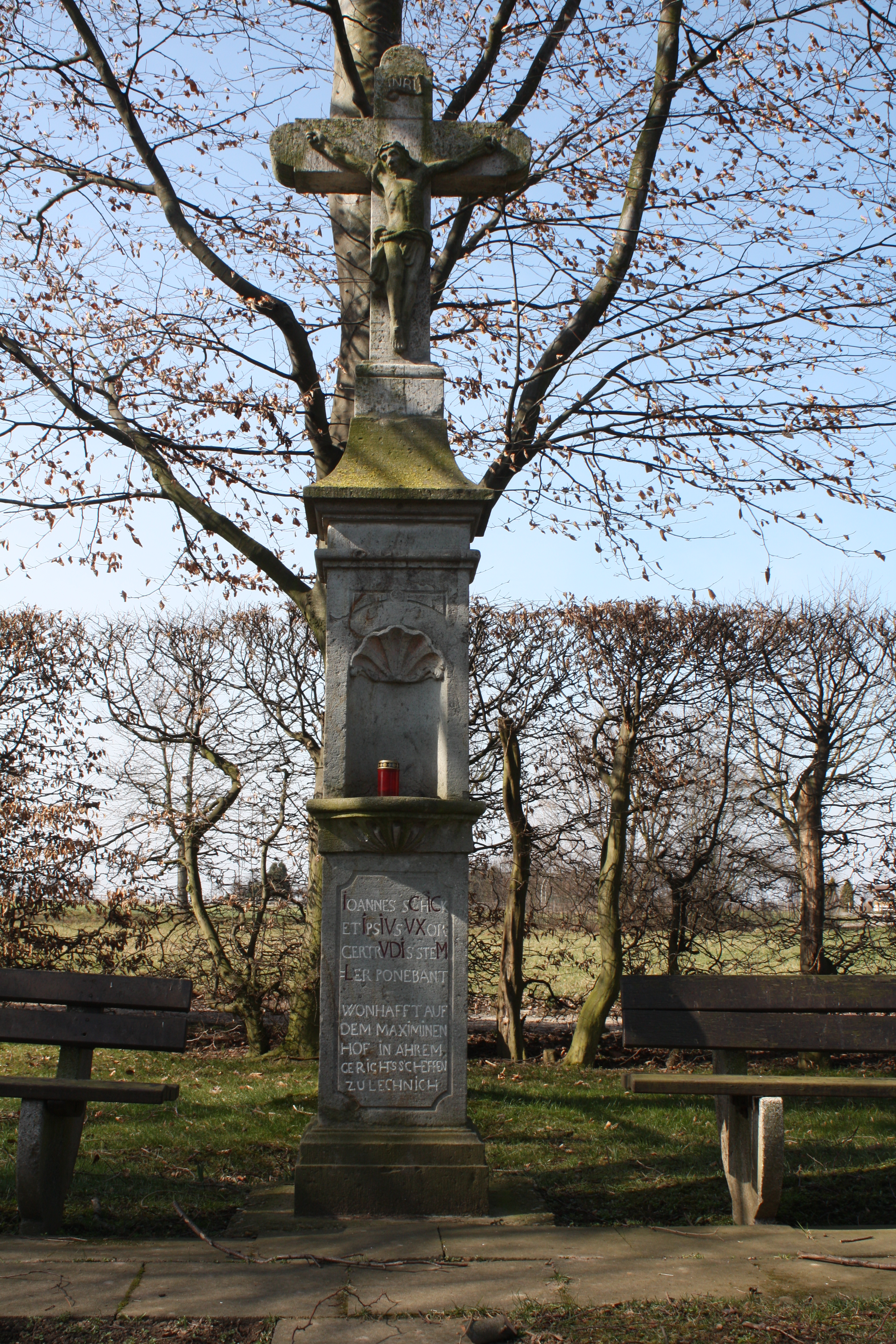 Ortsbild, Ahrem (Erftstadt)